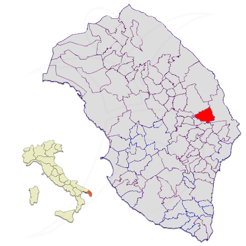 Il territorio di Cannole nella provincia di Lecce.